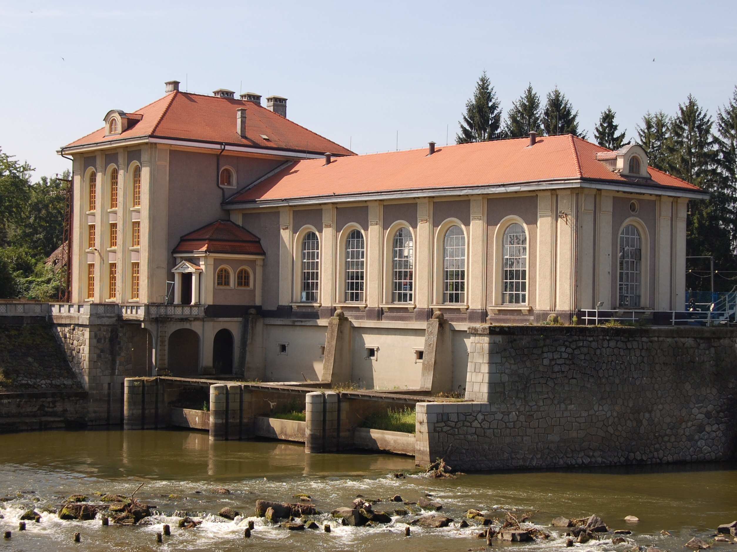 Vodní elektrárna, U Strže 1588, Kroměříž